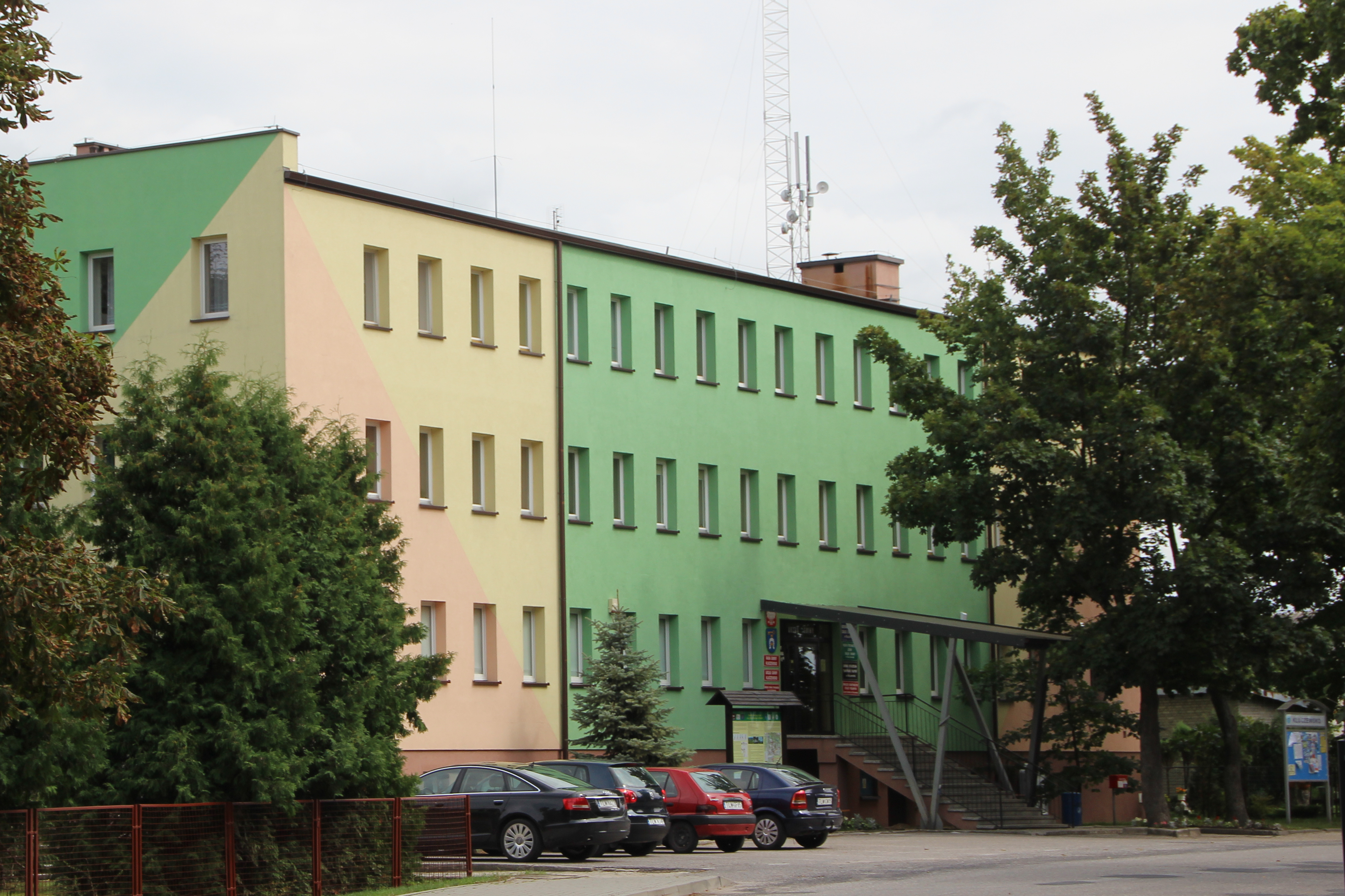 Kluczewsko - wieś w Polsce w województwie świętokrzyskim w powiecie włoszczowskim, w gminie Kluczewsko.